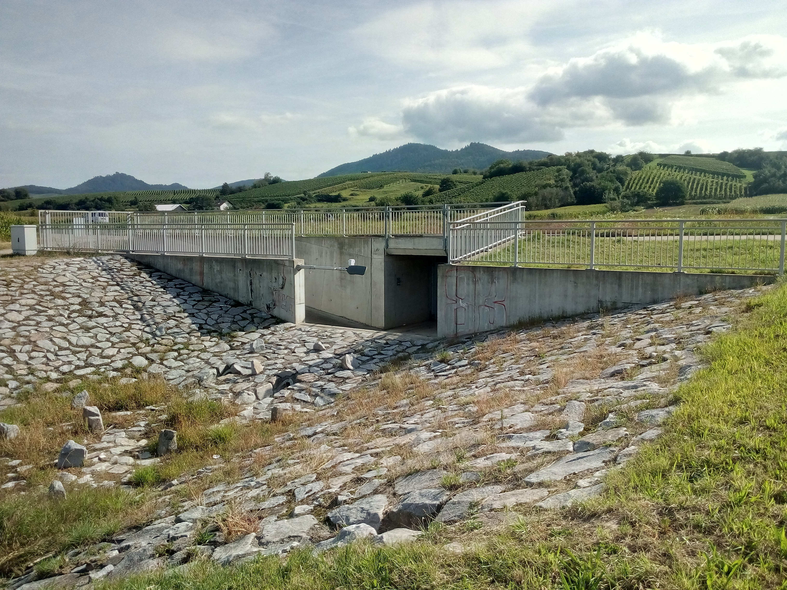 Sandbach, Hochwasserentlastung Bühlot, Tunnelende an der alten B 3 nördlich von Bühl